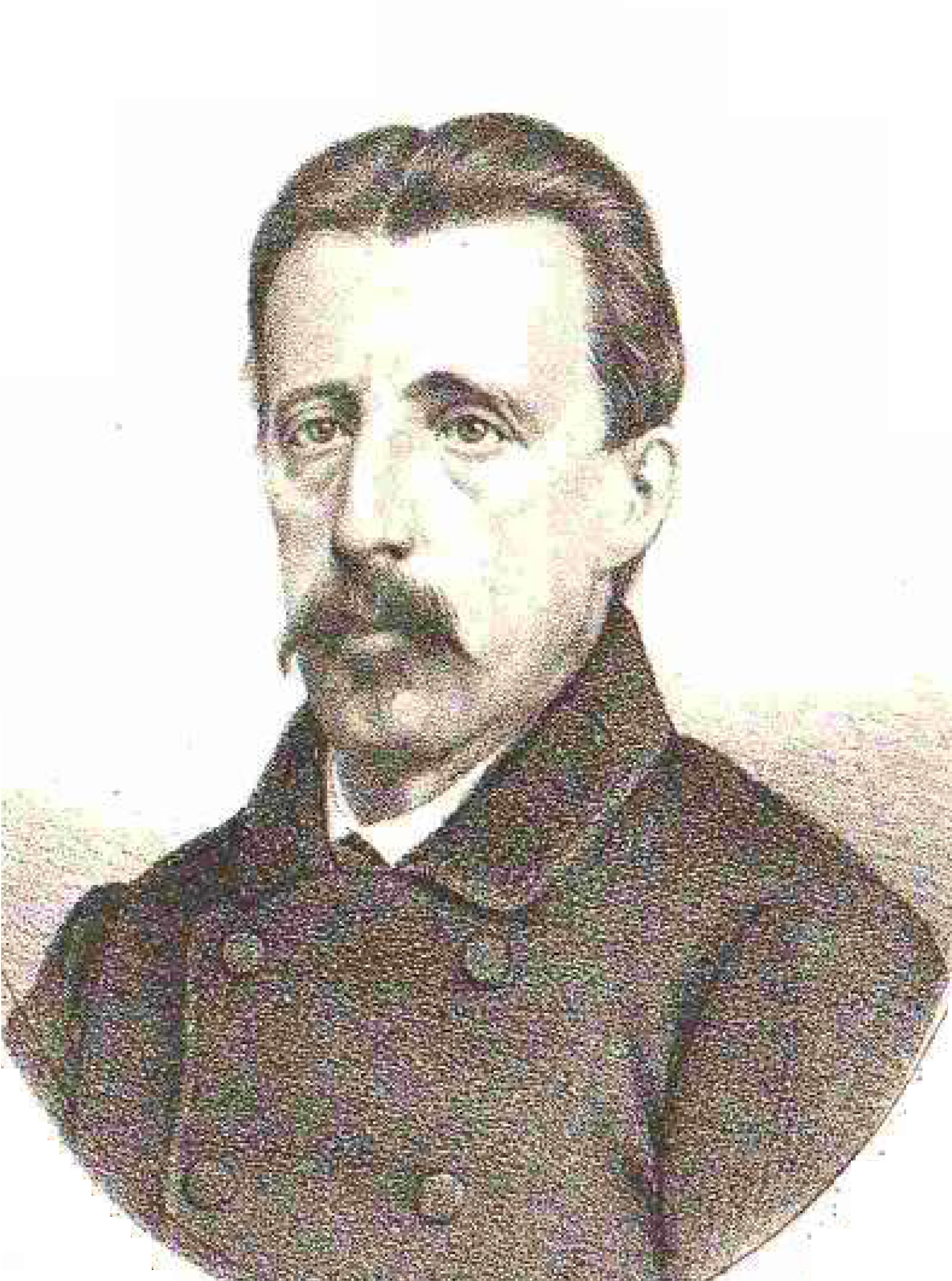 Lámina de Los diputados pintados por sus hechos.